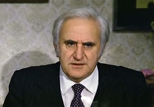 Adolfo Celi in Amici miei.